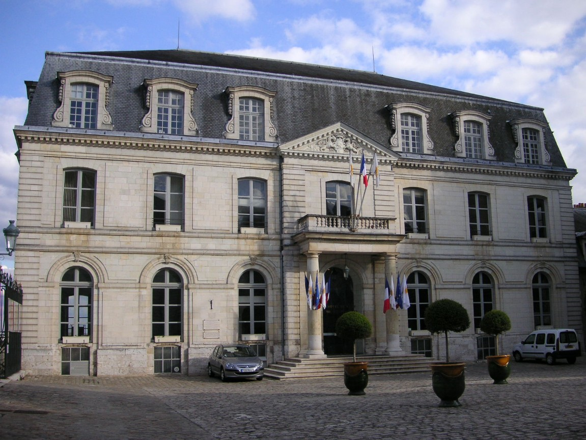 France, Blois, Hotel de Ville